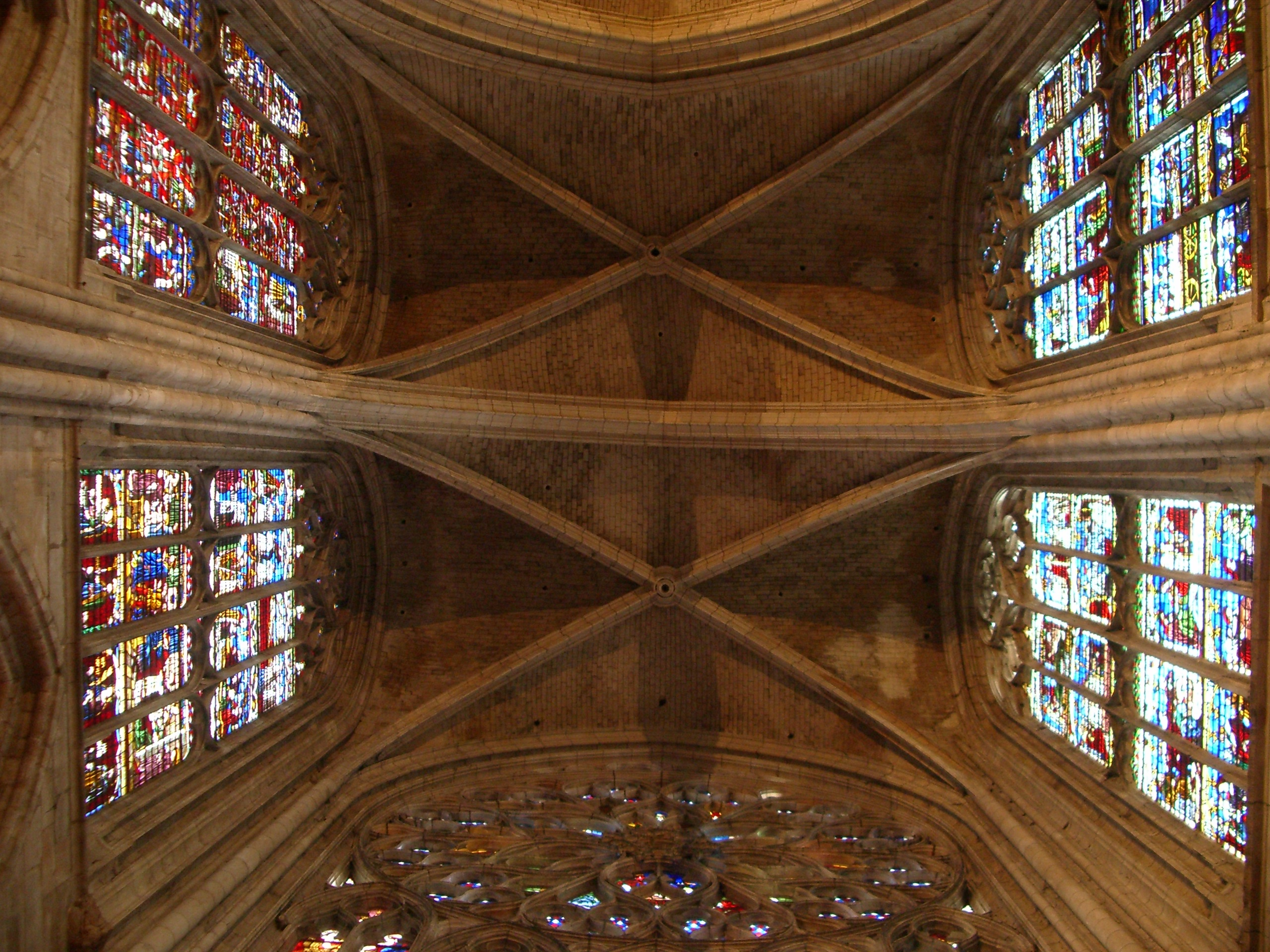 Sens (France, dept. Yonne) - ceiling of the Cathédrale de Saint-Etienne - personal photo, 08.12.2005